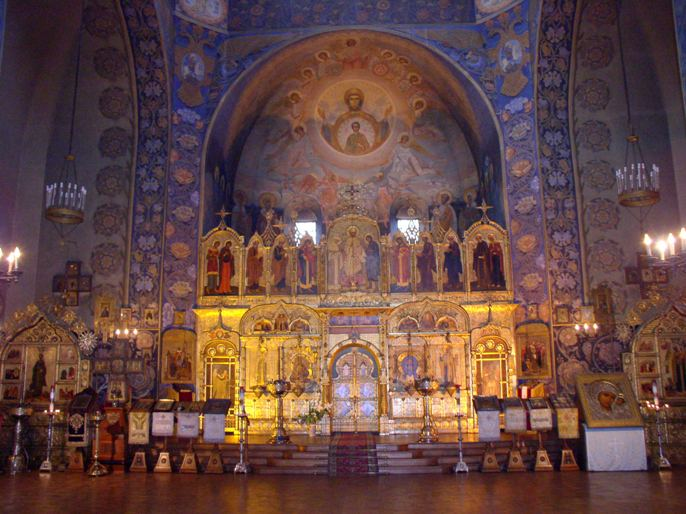 Внутренний вид Собора Святого Николая в Ницце